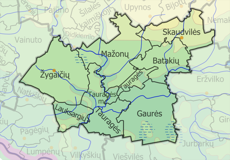 Padaryta iš :image:LietuvosSeniunijos.png